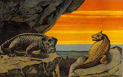 Geikia elginensis and Sclerosaurus armatus